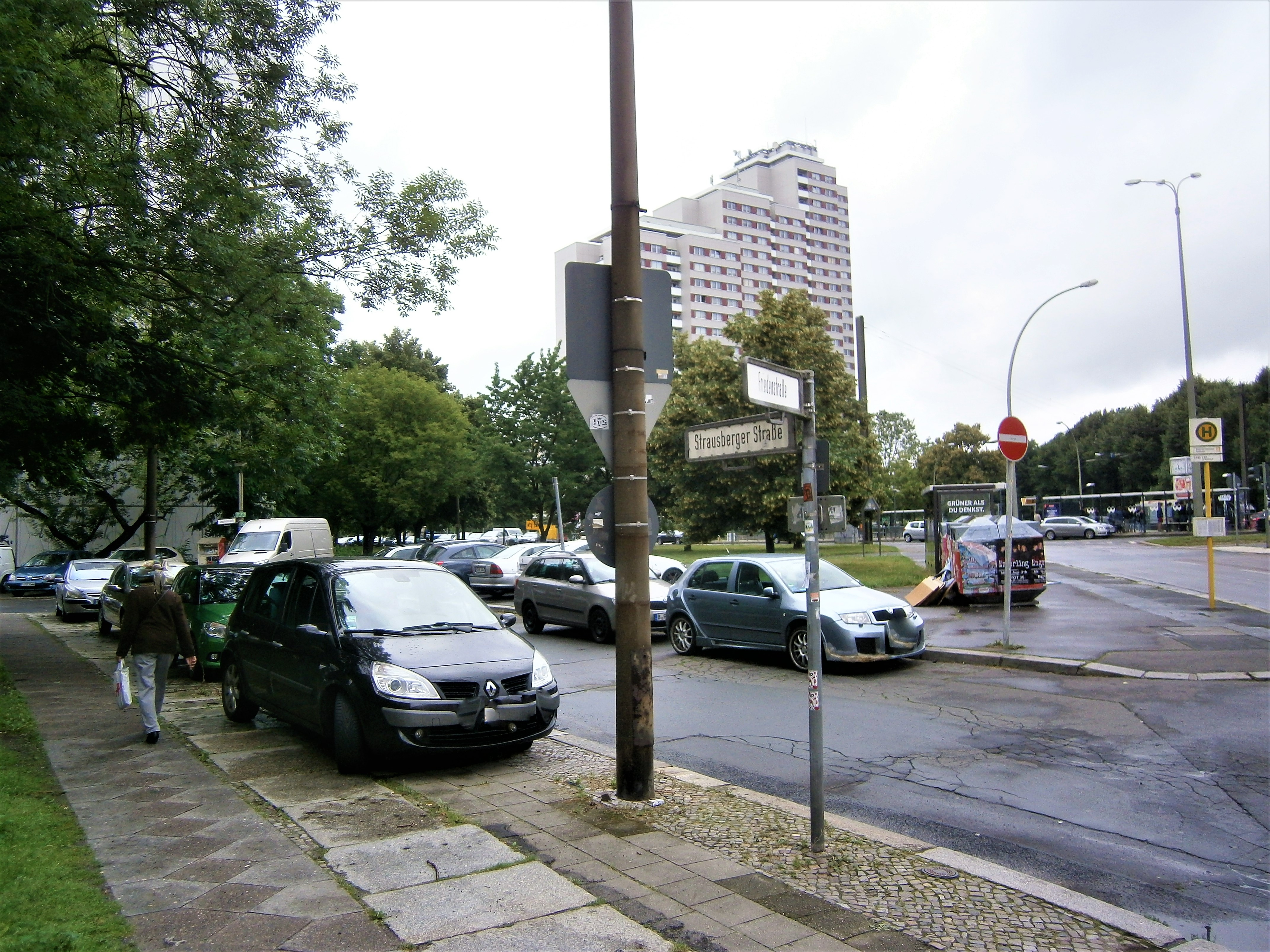 Die Friedenstraße ist eine Straße im Berliner Bezirk Friedrichshain-Kreuzberg, Ortsteil Friedrichshain. Angelegt und benannt wurde sie 1871-1876 auf dem Communicationsweg außerhalb der abgerissenen Berliner Zollmauer. Bereits seit dem Anlegen und der Bebauung bestand eine Teilung der Straße auf Königstadt und Stralauer Viertel. Aktuell sind es drei unterschiedene Straßenabschnitte: regionale Straßenverbindung im Barnimkiez am Volkspark Friedrichshain, am Platz der Vereinten Nationen als Parkzone, südlich im (Planungsraum) "Friedenstraße" als Ergänzungsstraße. Blick zur Einmündung der rechtwinklig an die Friedenstraße (rechtsabbiegend) angeschlossenen Strausberger Straße.